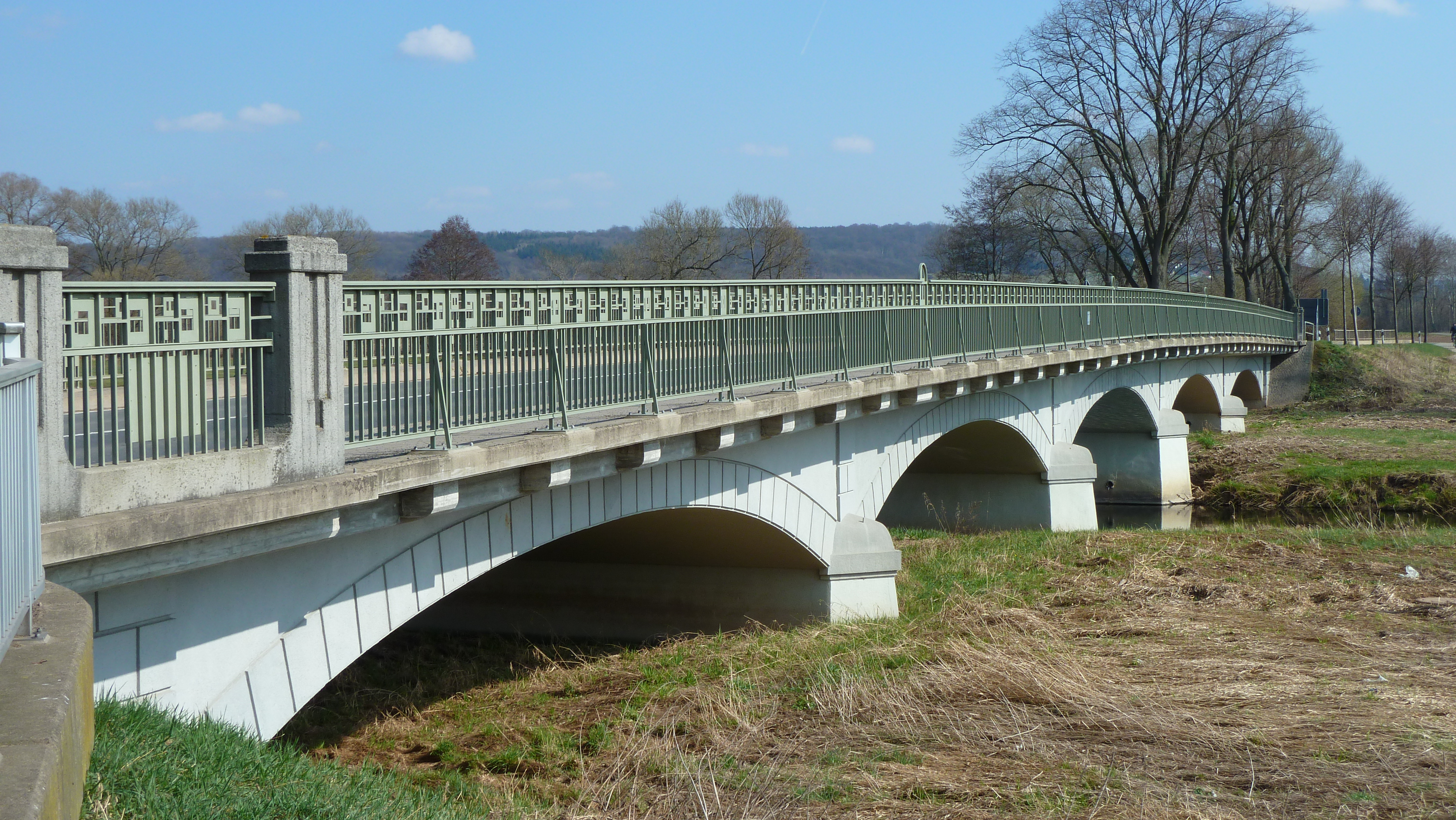 Leinebrücke bei Hollenstedt, Stadt Northeim, Südniedersachsen. Erbaut 1909–10 vom Kreis Einbeck, 1994 vom Land Niedersachsen saniert und überformt